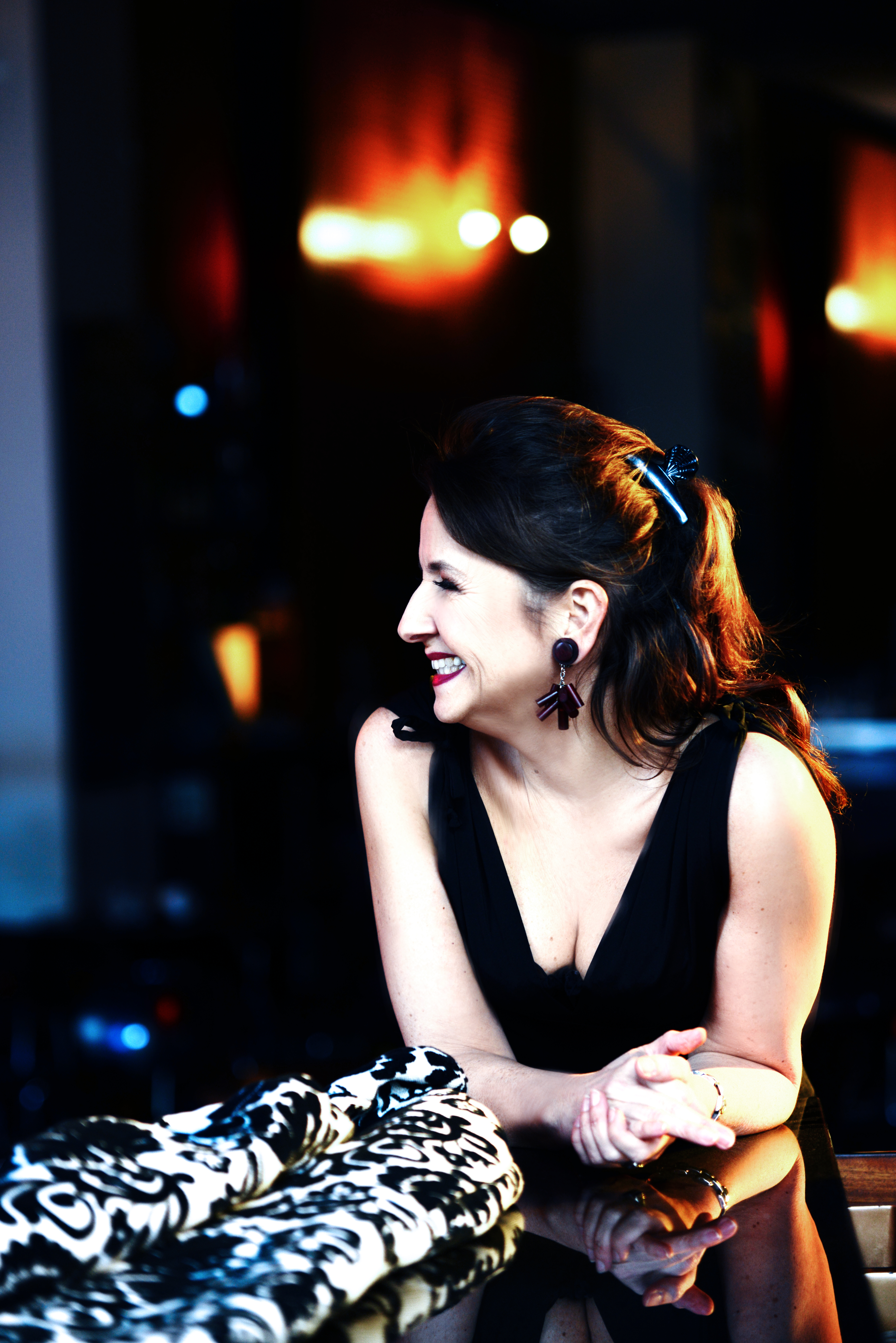 Alexa Rodrian, Foto by Miriam Knickriem